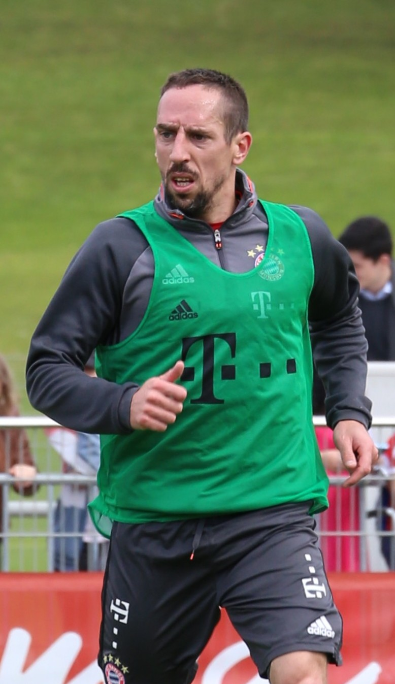 Franck Ribéry, am 3. Mai 2017 beim Training auf dem Gelände des FC Bayern München